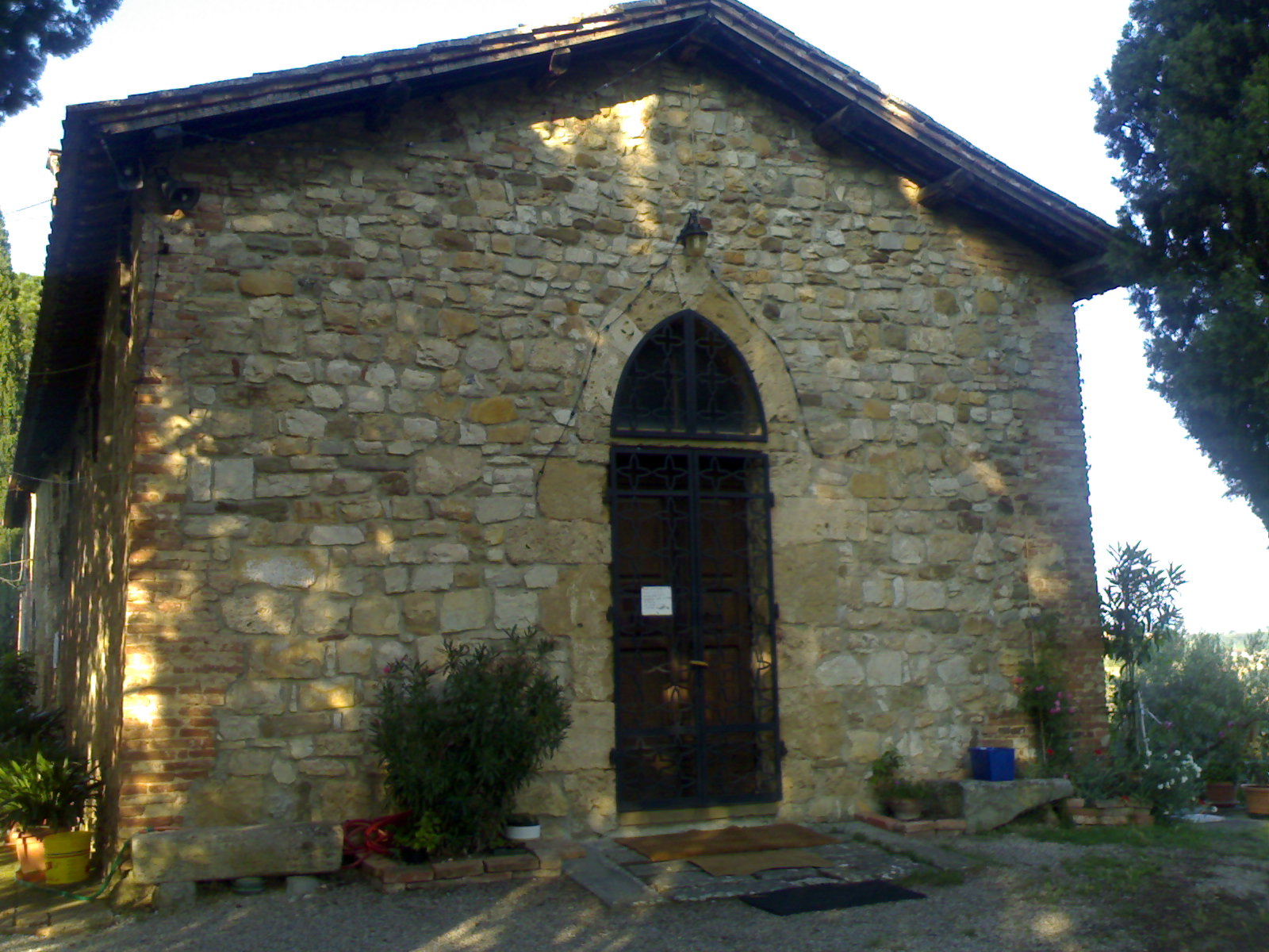 vale